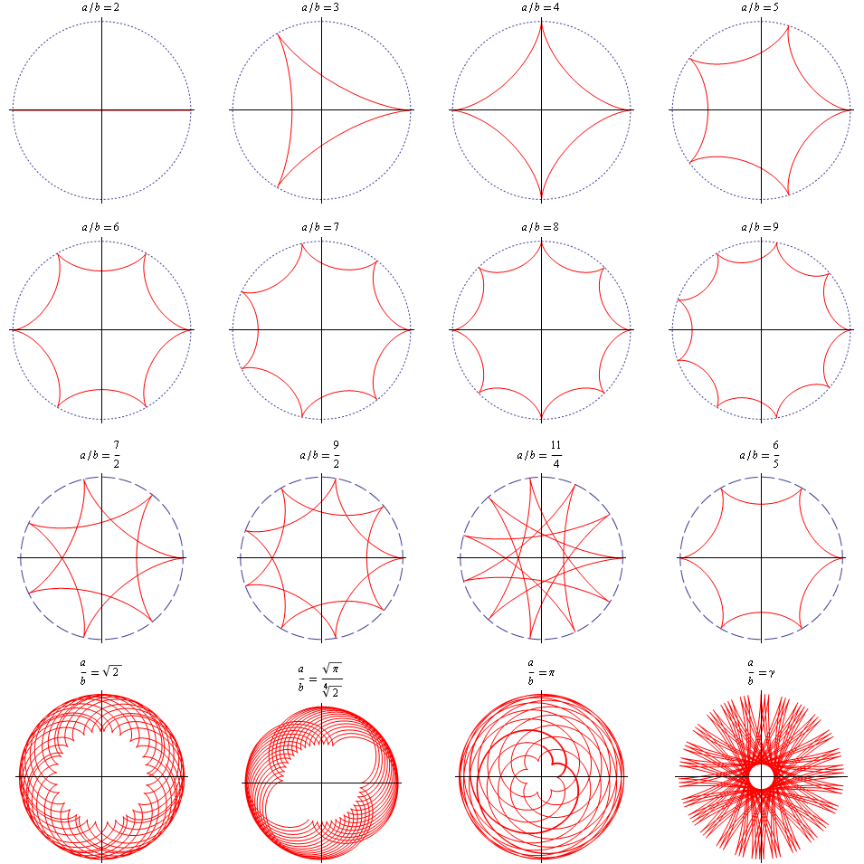 Hypocycloid